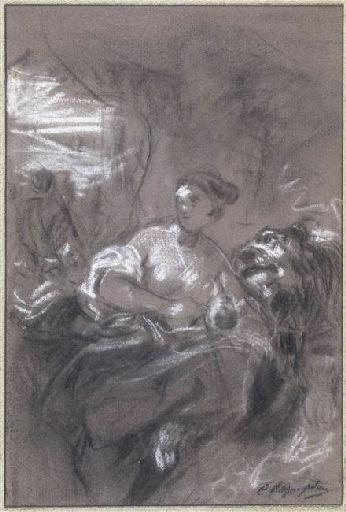 "Le Lion amoureux". Kreidezeichnung, H. 181mm; L. 122mm. Musée national Magnin, Dijon